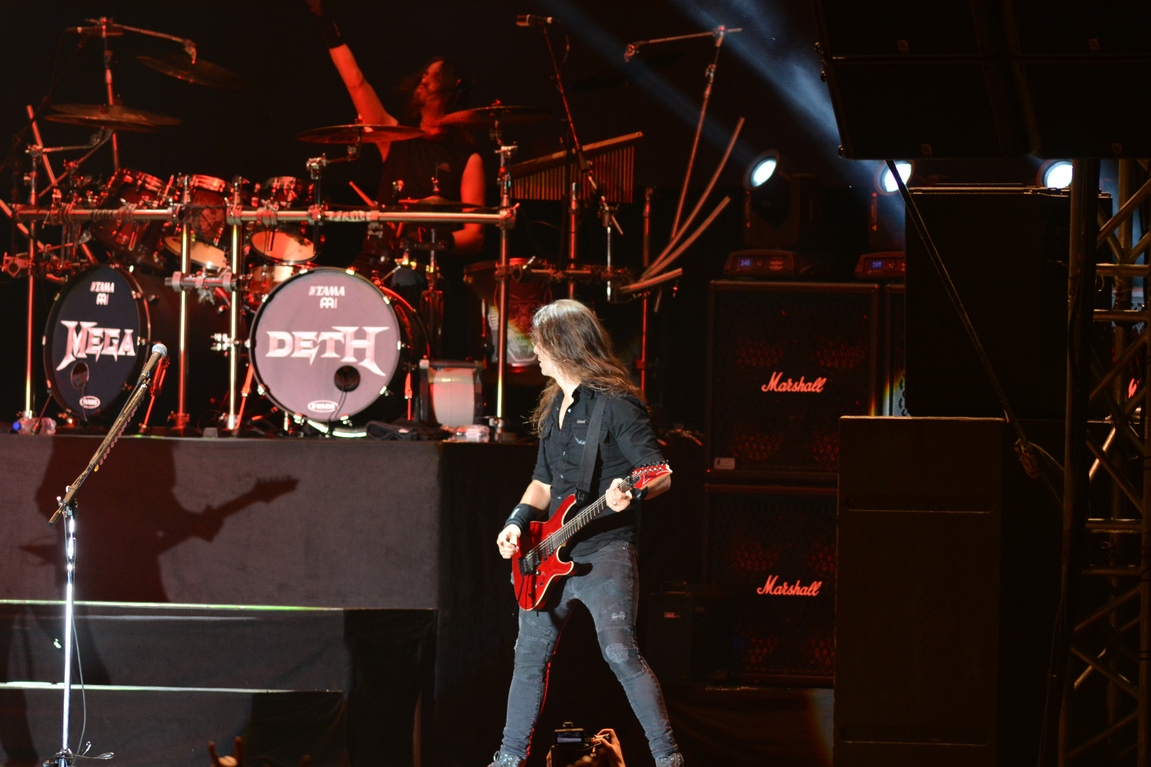 Megadeth beim Elbriot 2017